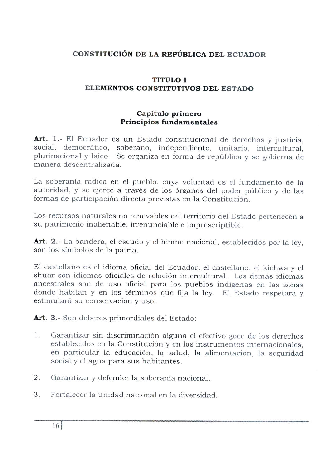 Hoja 6 de la publicación ofiacil de la Constitución de Ecuador de 2008.